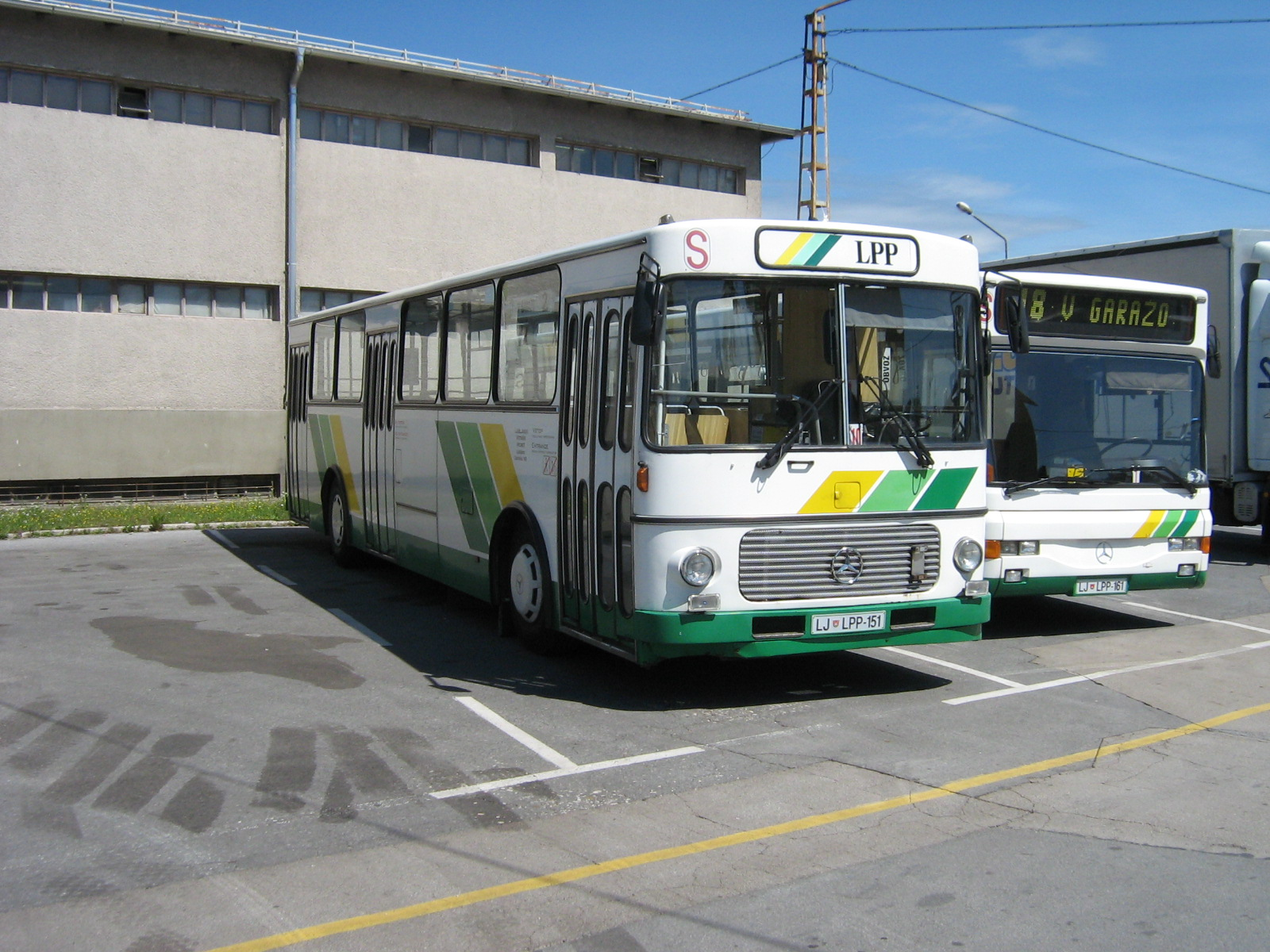 Avtobus FAP Sanos S-115 v lasti Ljubljanskega potniškega prometa. Avtor: Uporabnik:BurekBuster.